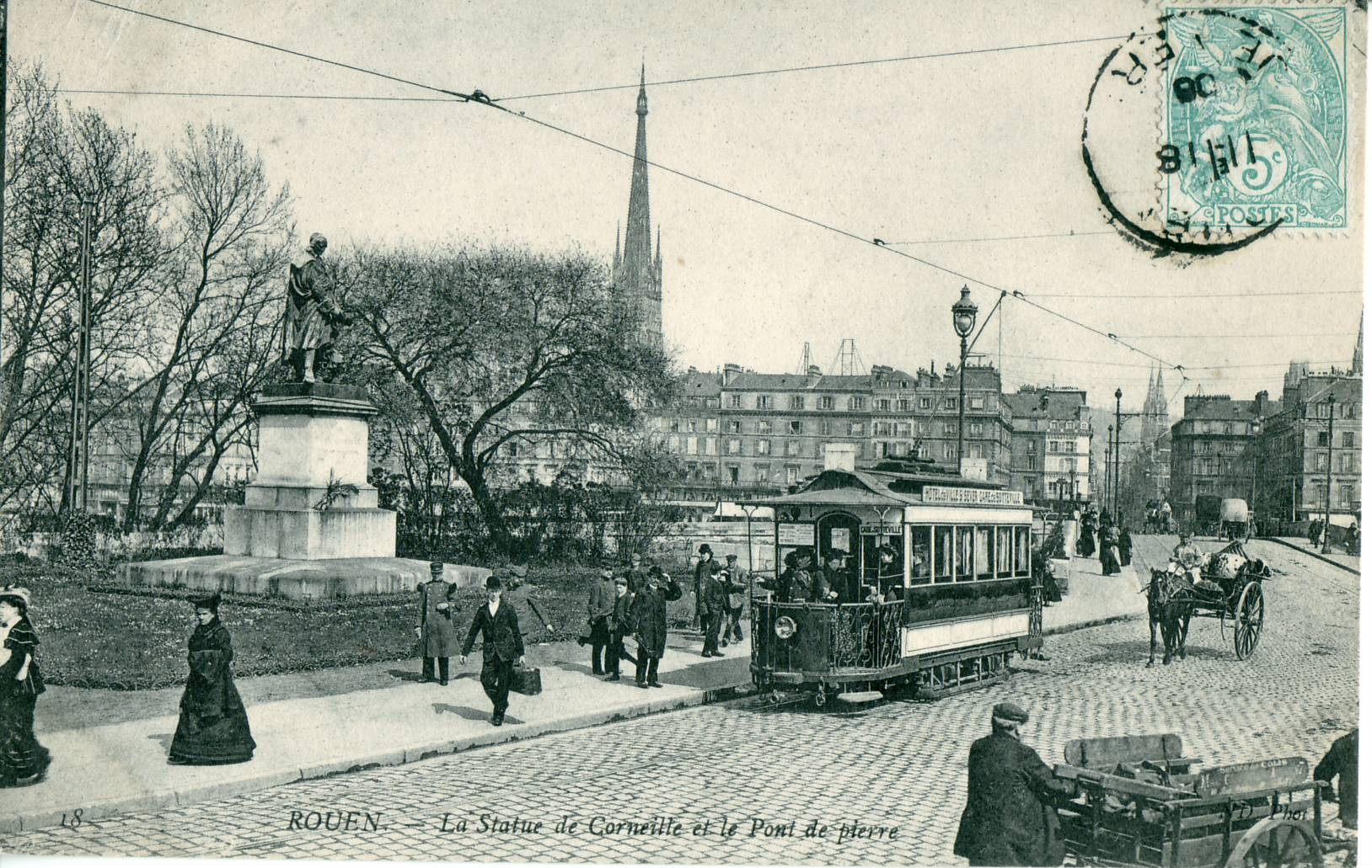 Carte postale ancienne éditée par ND, n°18 Rouen - La Statue de Corneille et le Pont de Pierre